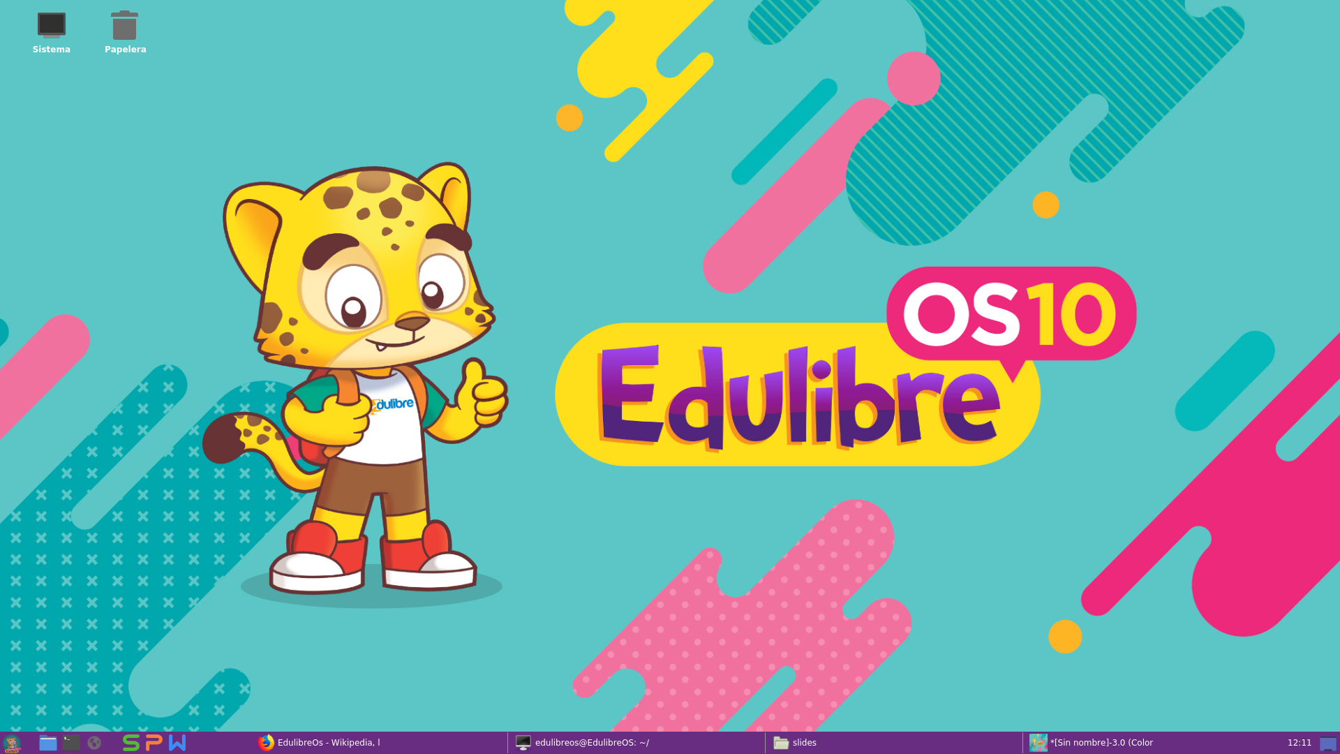 EdulibreOS-V10.0-Desktop